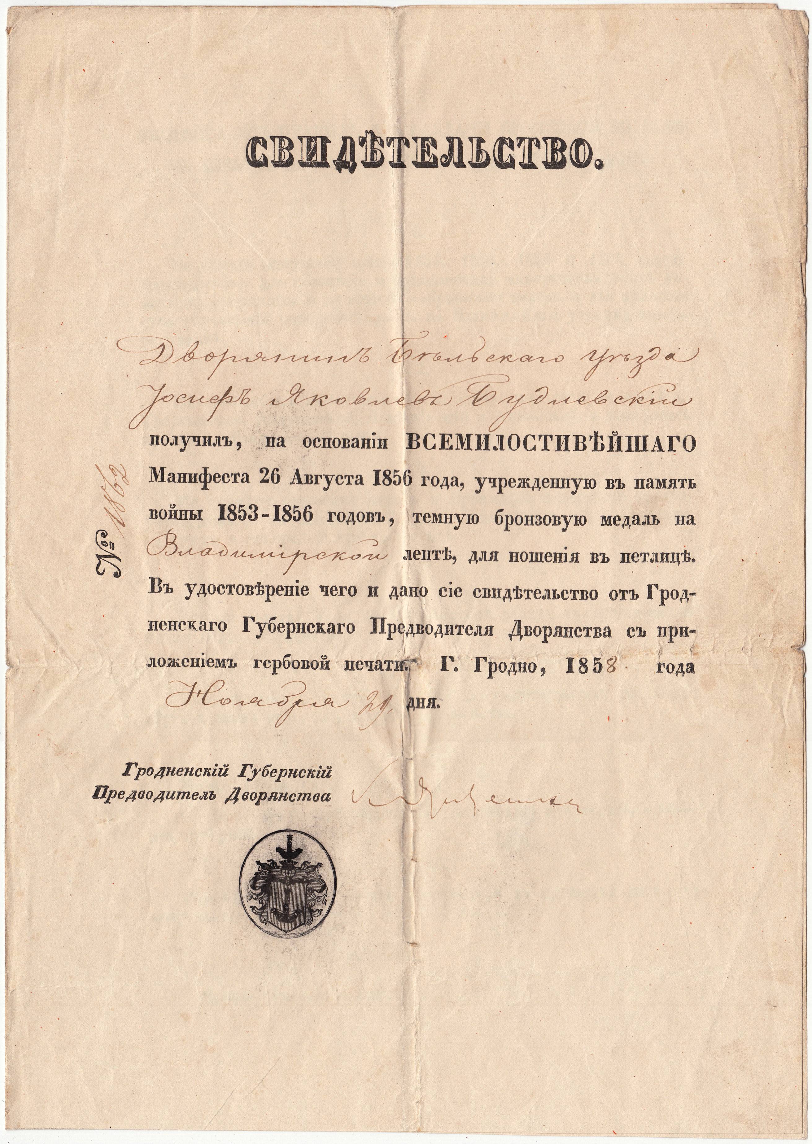 Świadectwo (Nr. 1862) przyznania brązowego medalu Wojny Krymskiej 1853-1856 na wstędze Wladimirowskiej